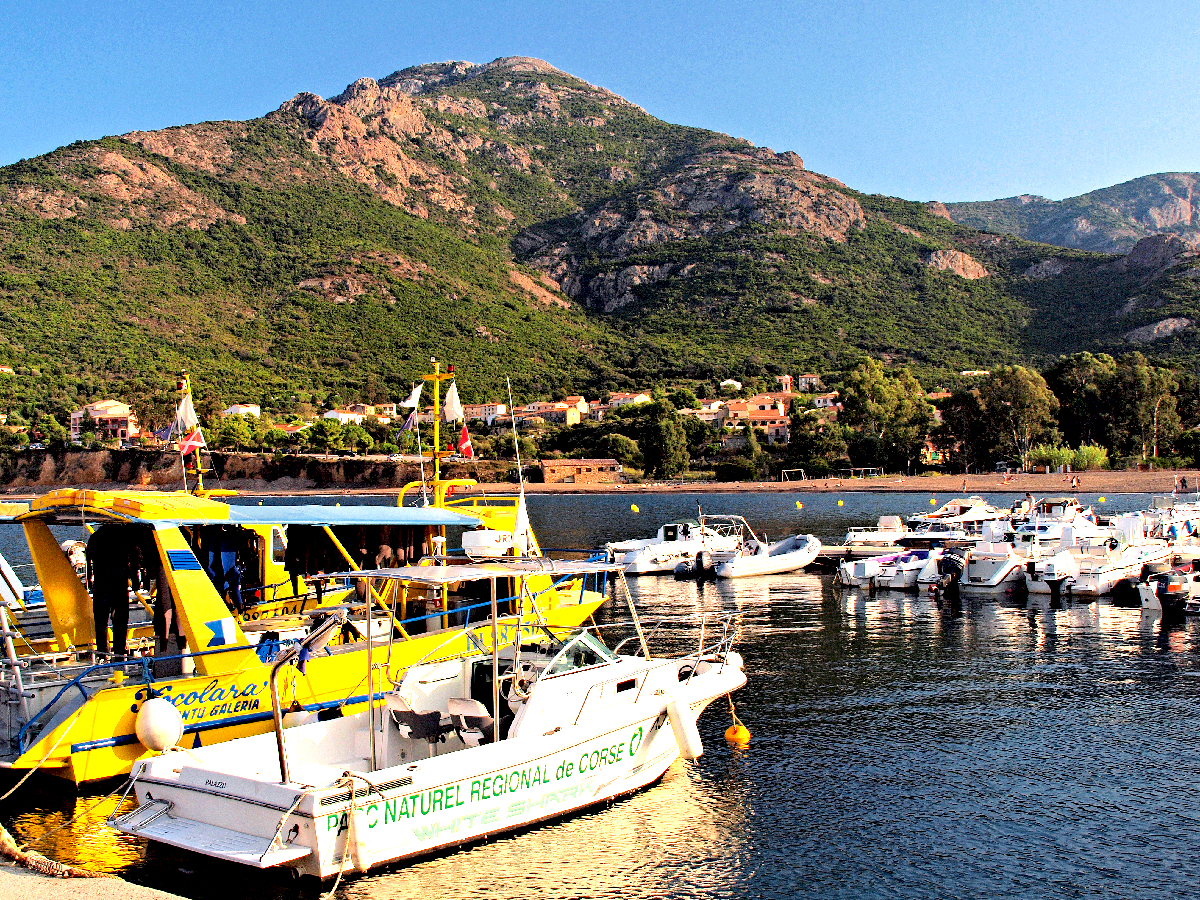 Galéria - Le village vu du port